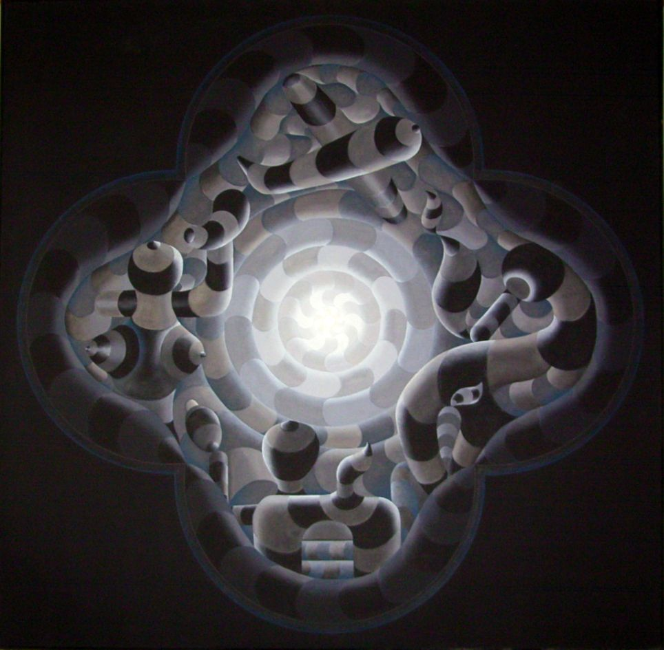 Centrovision 168; 170cm x 170cm acrylic-calico-maljute